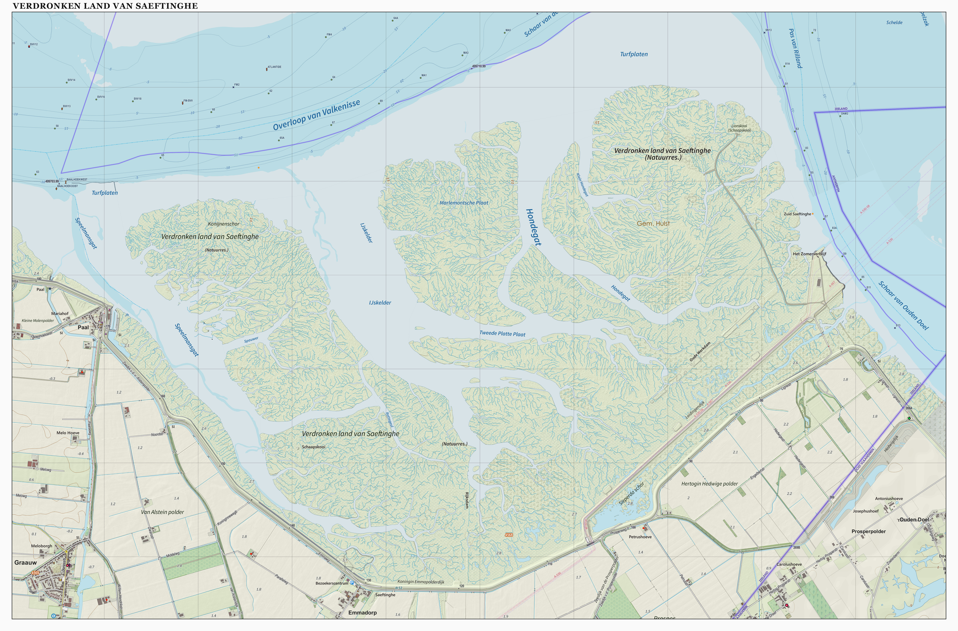 Topografische kaart van het verdronken land van Saeftinghe (natuurgebied). Resolutie: 400 pixels/km. Kaartbeeld samengesteld uit de open geodata van de Top10NL en Top25namen (Basisregistratie Topografie Creative Commons BY licentie. Gebouwvlakken uit open geodata BAG extract. Wegen uit de OpenStreetMap, OpenStreetMap community. Reliëfschaduw uit de Actuele Hoogtekaart AHN2. Samenstelling en kleurenschema: Jan-Willem van Aalst, met QGIS2. Zie ook de Legenda.